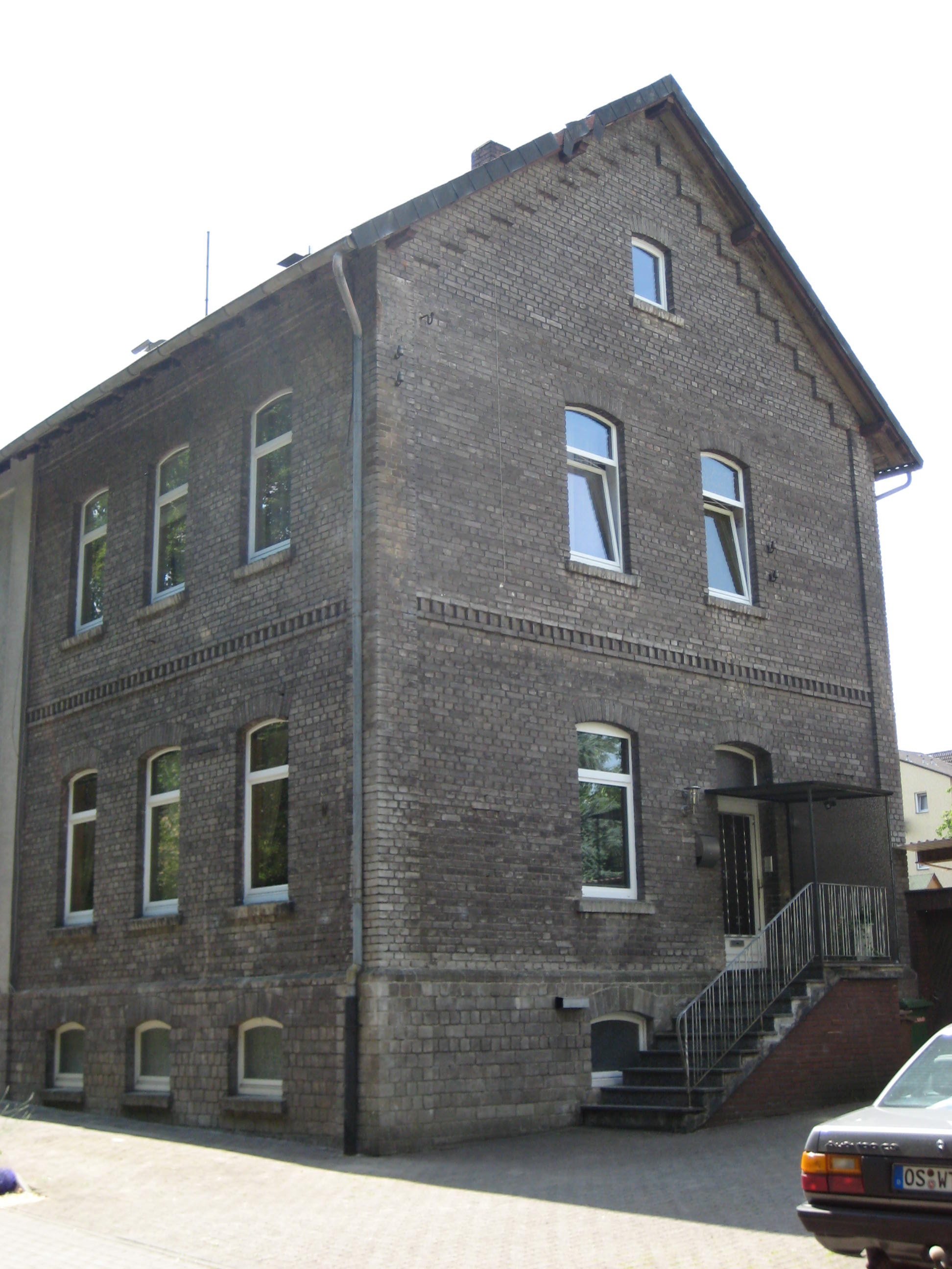 Aus Schlackenstein gebaute Wohnhäuser an der Schlossstraße in Georgsmarienhütte